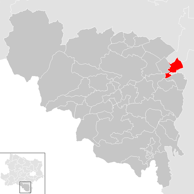 Bezirk Neunkirchen